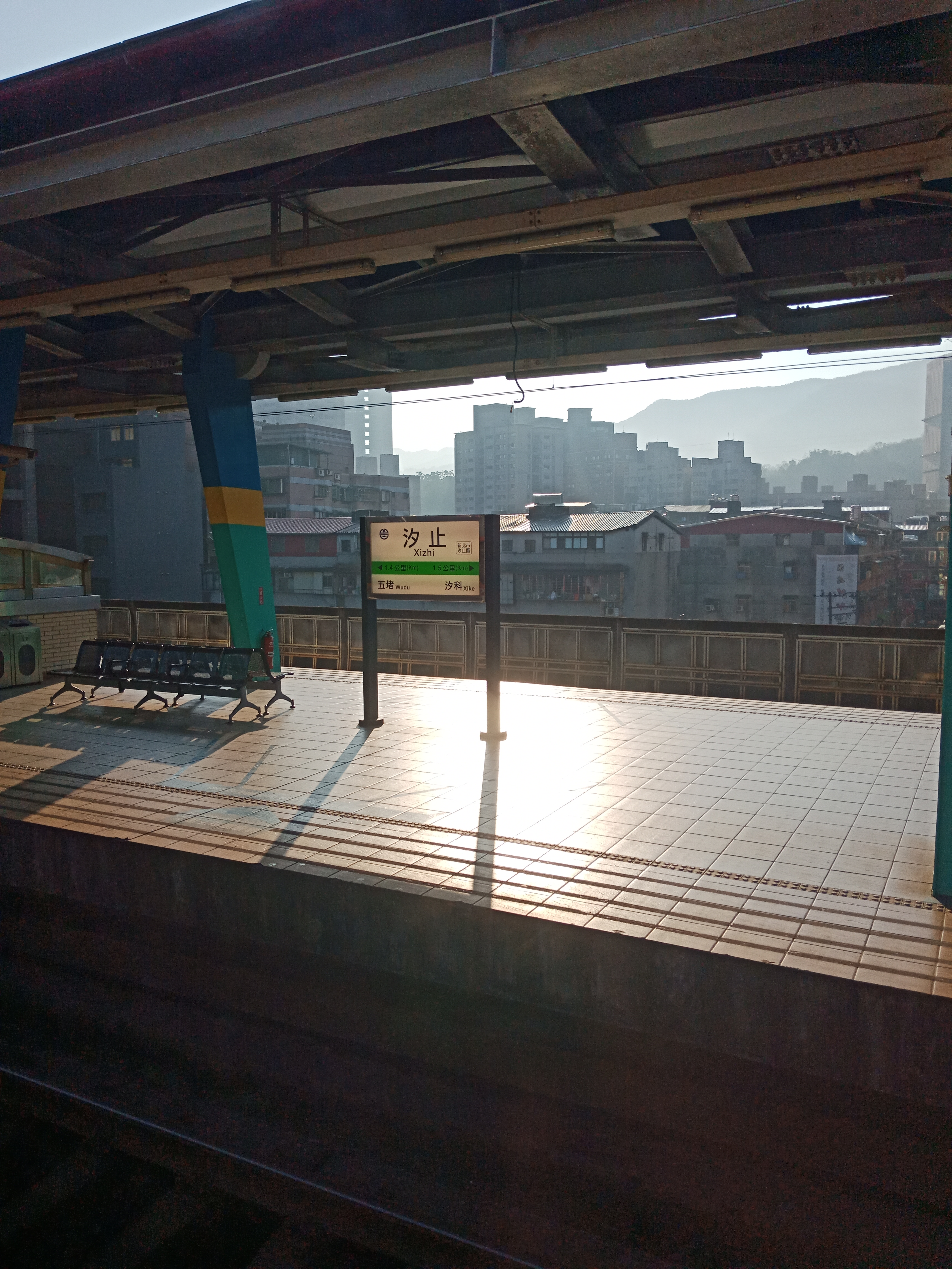 中文（台灣）: 臺灣鐵路管理局汐止車站第一月台。